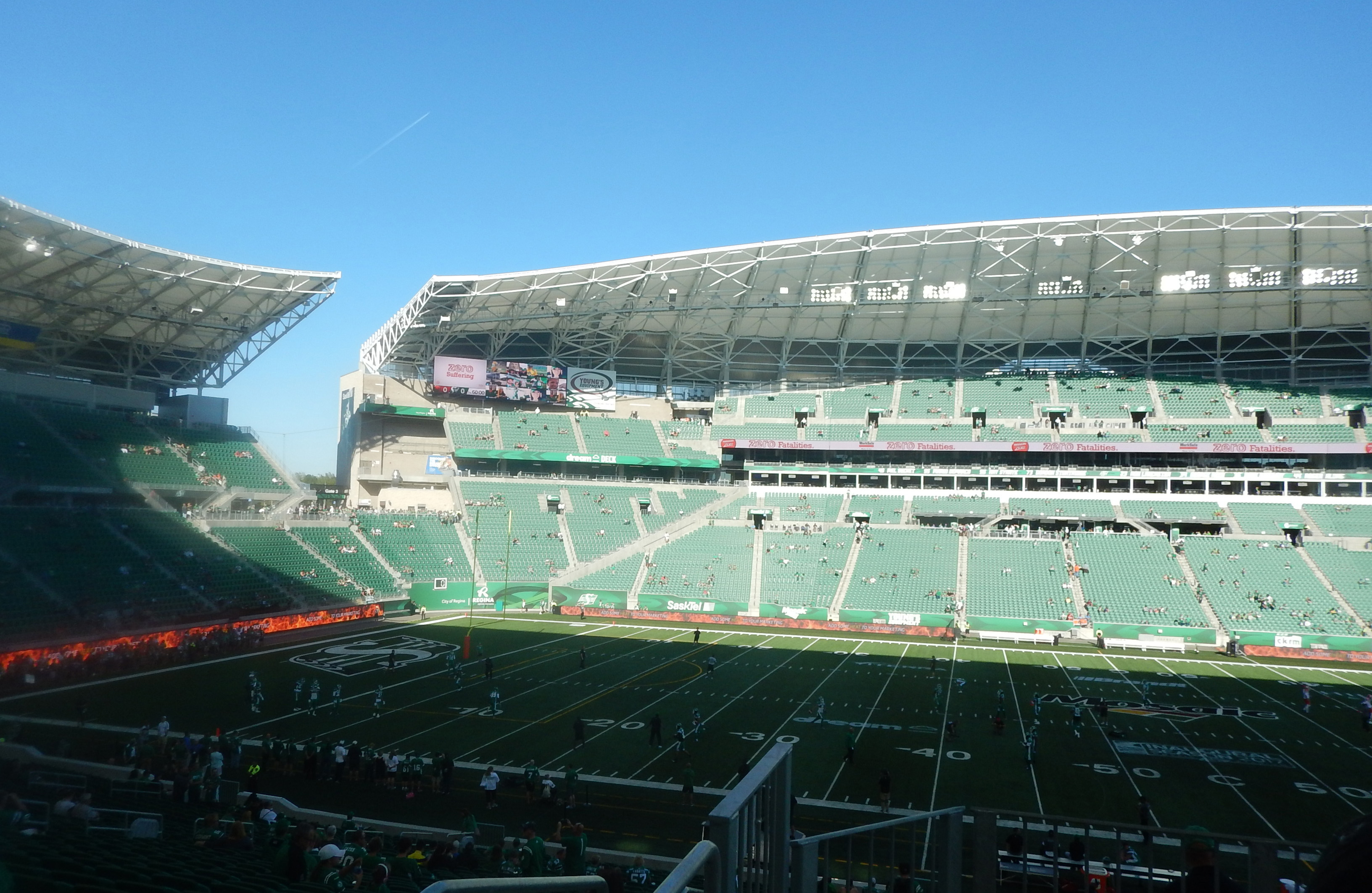 2017 08 12a Rider BC Game 44